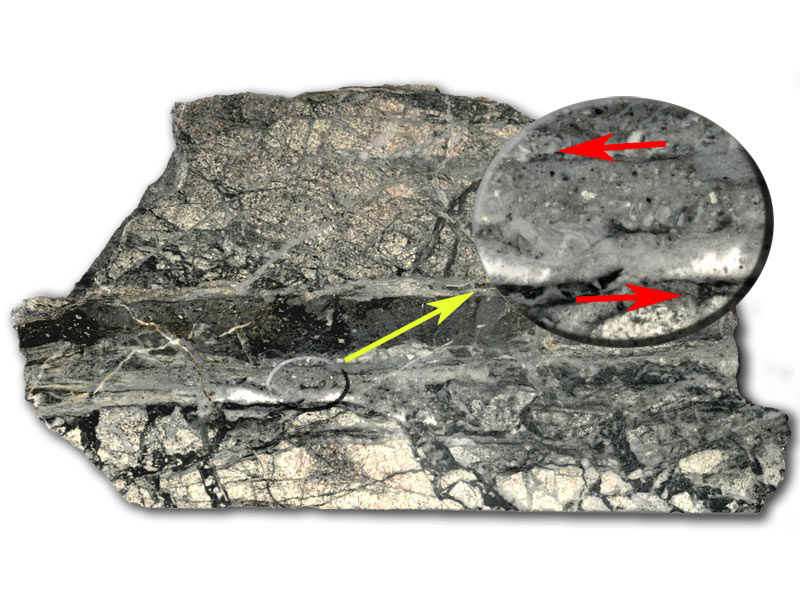 Fragment de pseudotachylite du cratère d'impact de Rochechouart (France). Pseudotachylite Les pseudotachylites sont formées sous l'effet d'un choc extrêmement violent, d'un tremblement de terre, ou encore d'une explosion nucléaire. Les roches du terrain qui subit l'onde de choc se déplacent et l'effet combiné de la pression et de la friction fait fondre les matériaux des fragments en déplacement. Ces matériaux en fusion s'écoulent ensuite dans les anfractuosités de la roche.